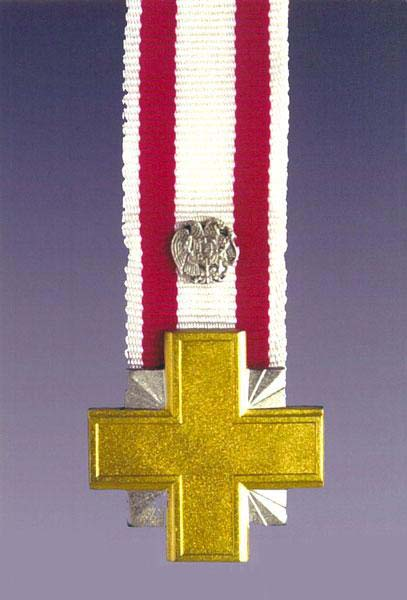 ՀՀ 2-րդ աստիճանի Մարտական խաչ շքանշան։